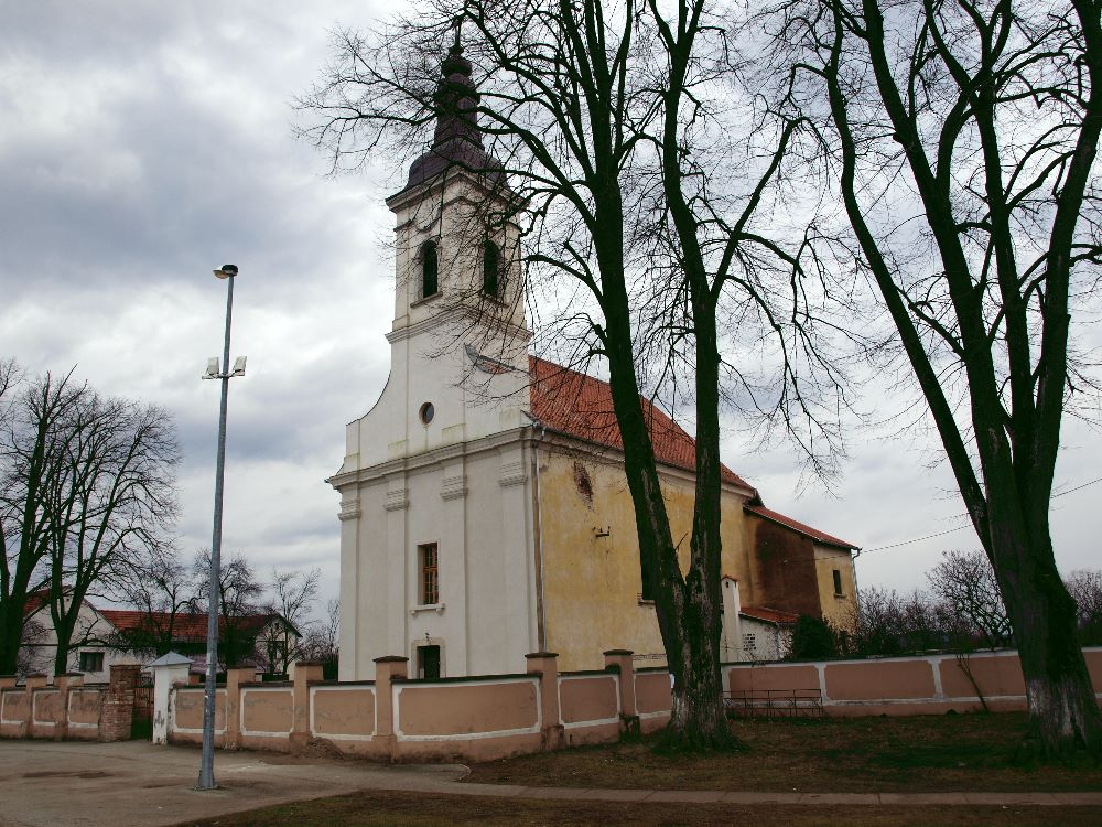 Crkva u Bebrini, Brodsko-posavska županija.